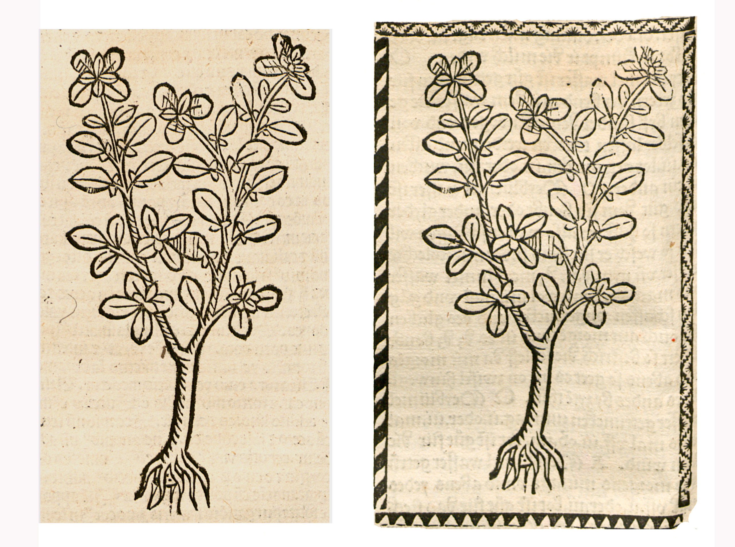 Abbildung von: Meigeron (Origanun maiorana)